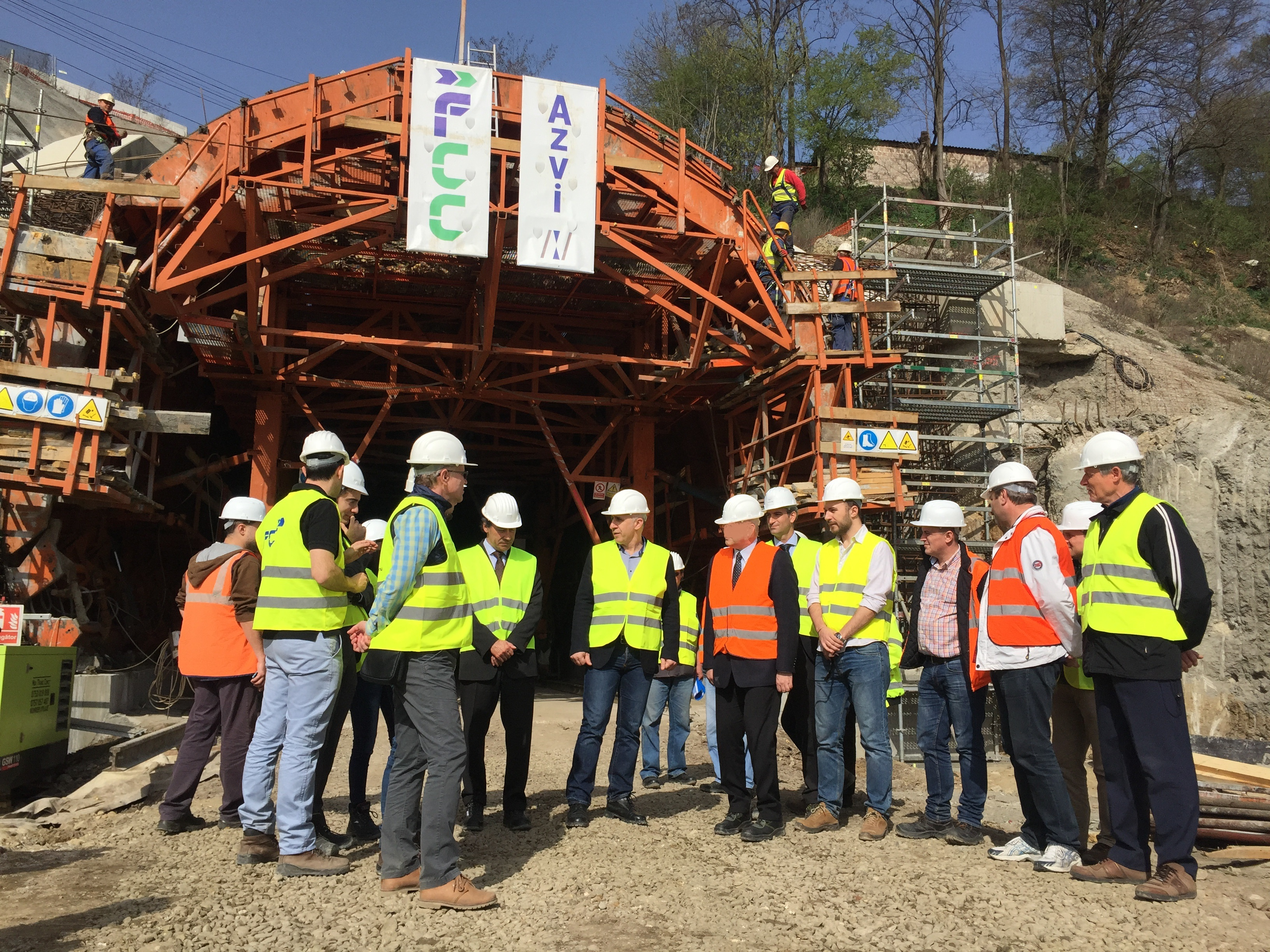 Primul tunel finalizat dupa 30 de ani în România, la Sighișoara, pe coridorul IV feroviar